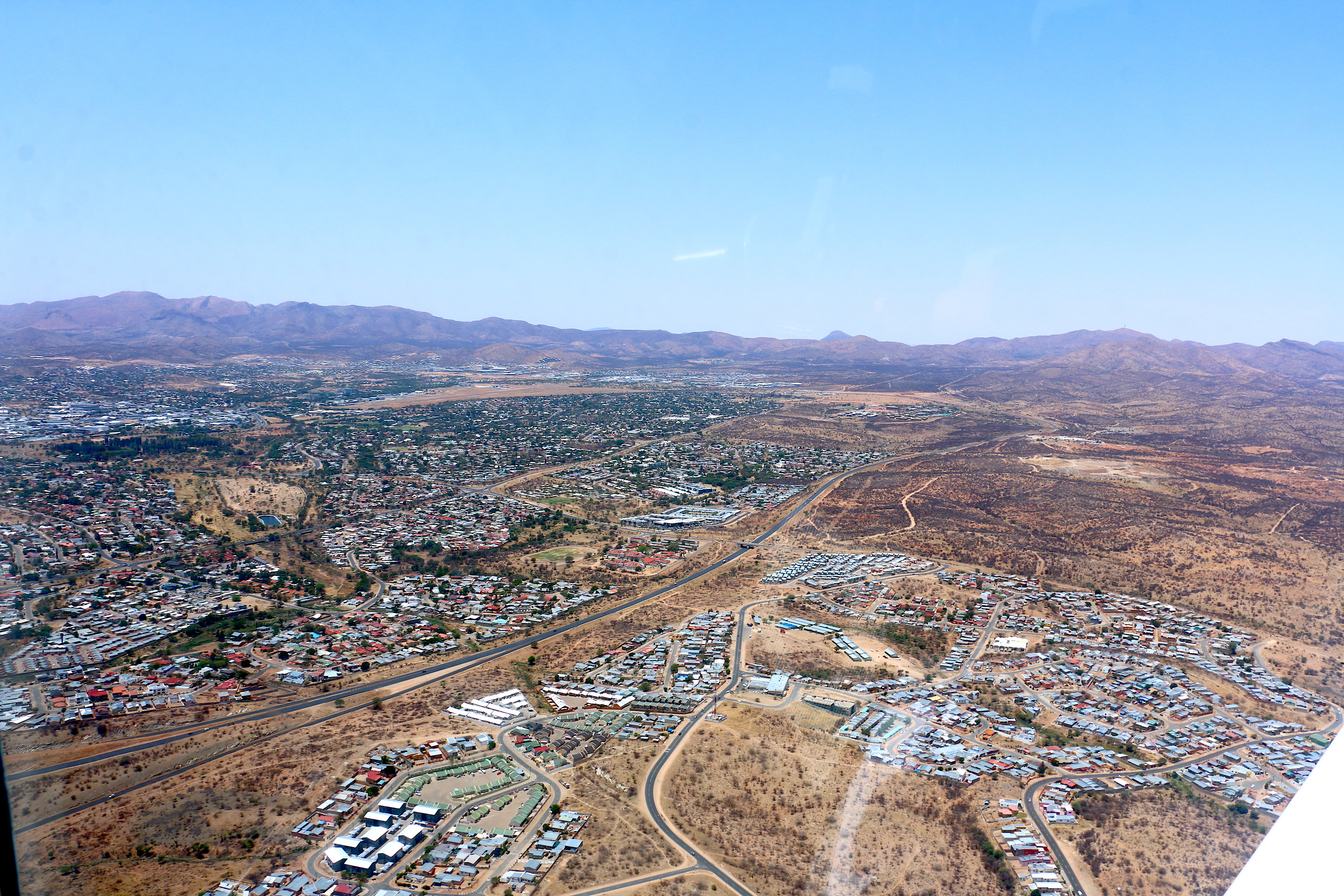 Windhoek Luftaufnahme (2016)